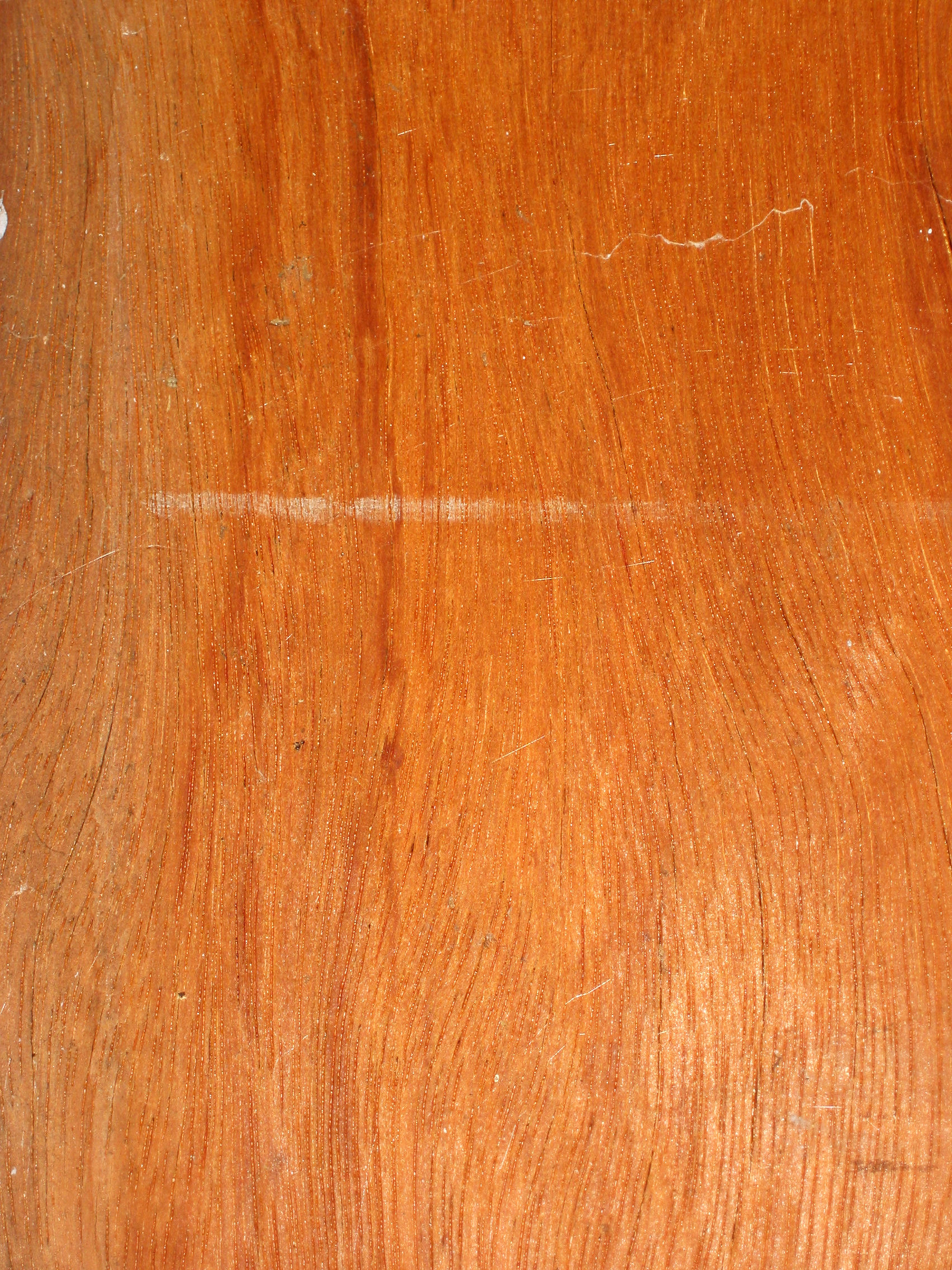 Bilinga (met kruisdraad)